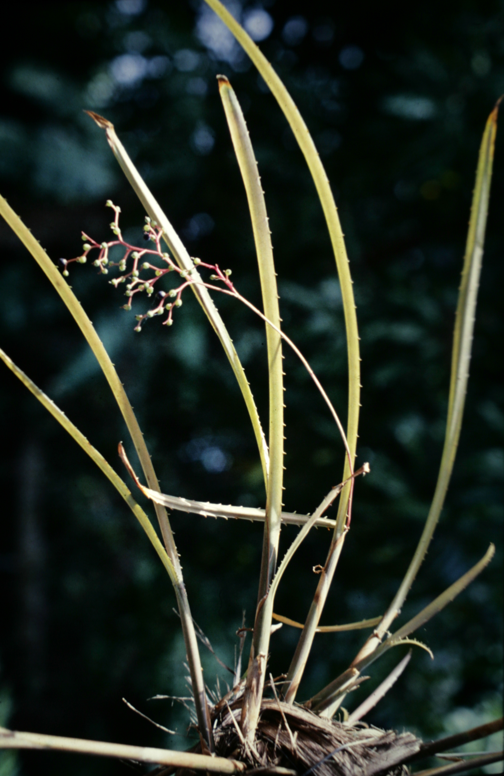 Araeococcus flagellifolius, Suriname